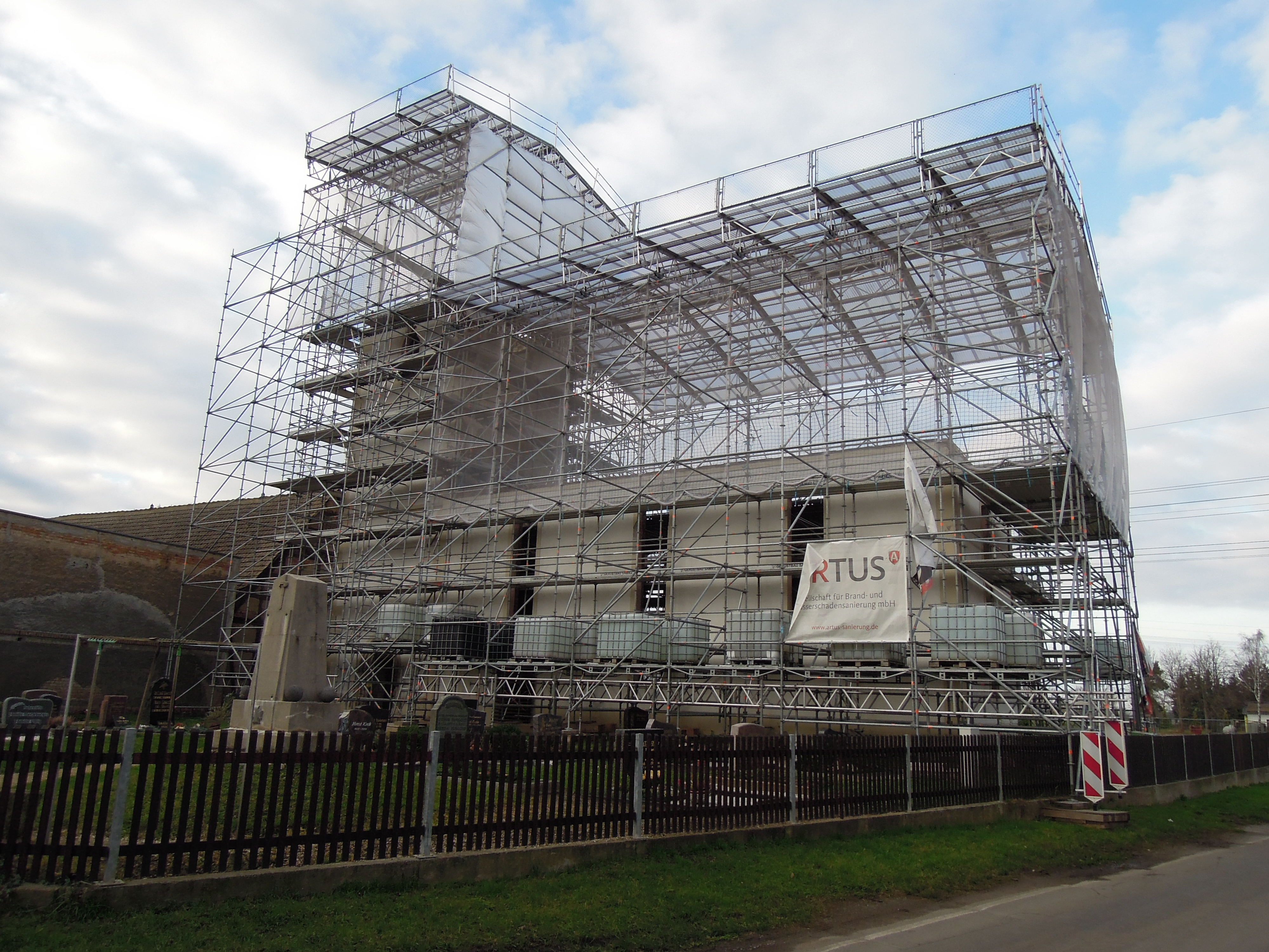 Wiederaufbau Tellschützer Kirche mit Eingerüstung ab Mai 2015D